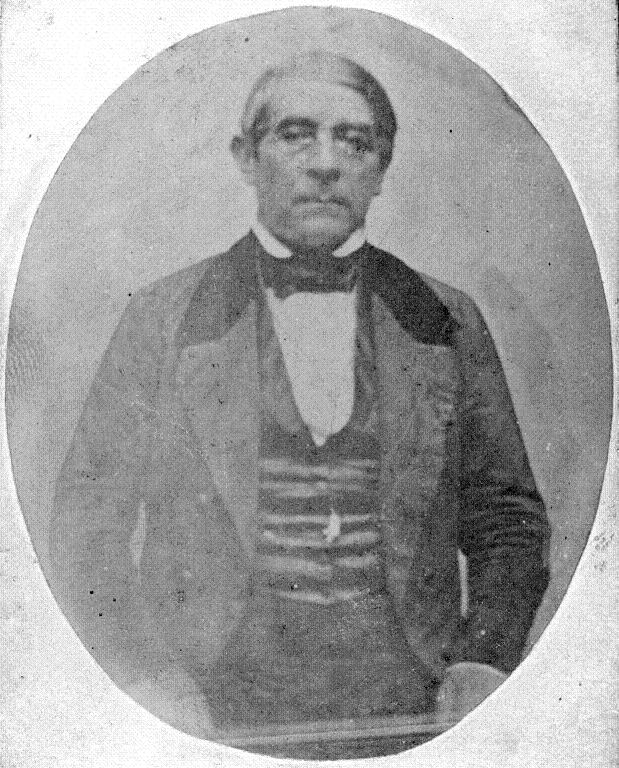 Daguerrotipo del militar y político uruguayo, Fructuoso Rivera (1784 - 1854).